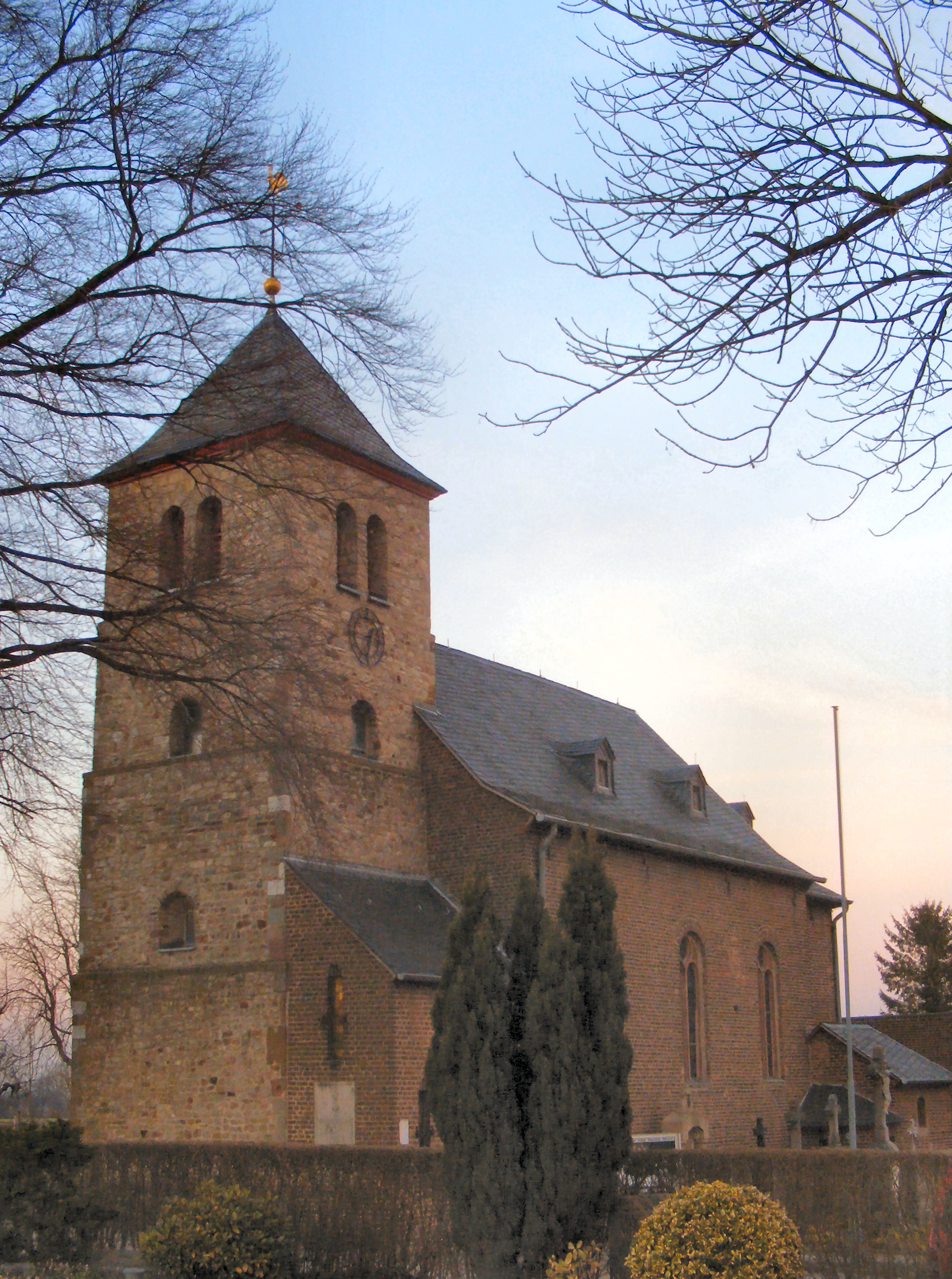 Die Kirche Hl. Maurische Märtyrer in Jülich-Bourheim am frühen Abend